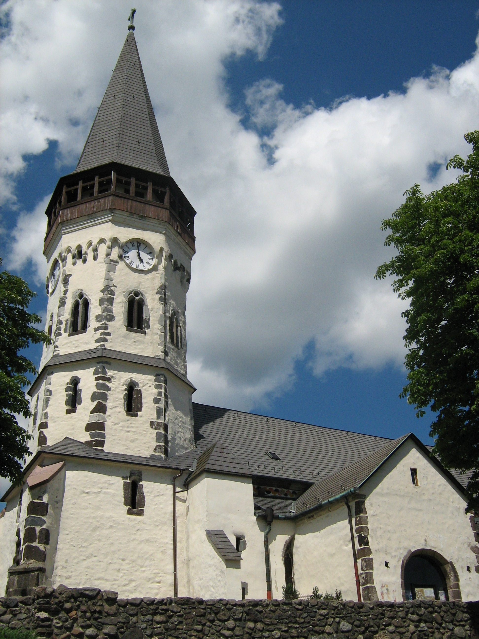 Gyöngyöspata, Árpád-kori plébániatemplom